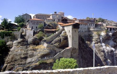 Meteora / Griechenland